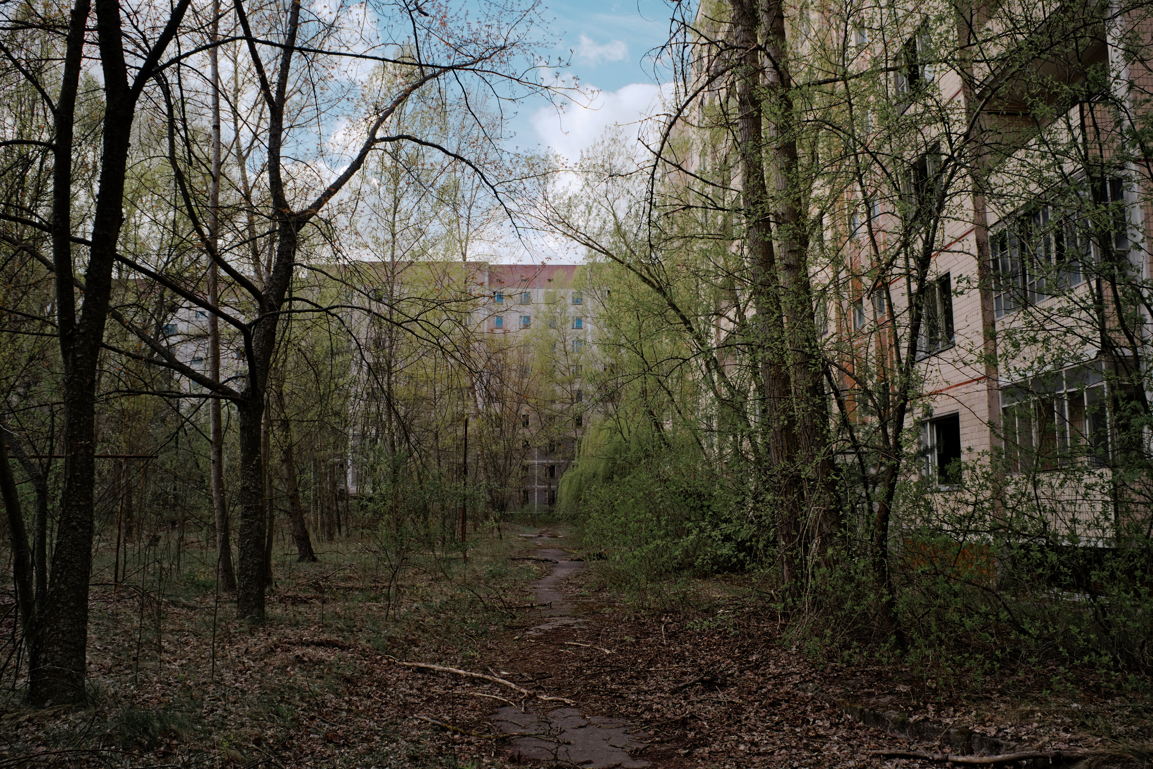 Затерянный в лесу / Lost in the forest Припять уже не тот город-призрак которым он был. Сейчас он поглощен лесом и растениями. Природа настойчиво отвоевывает свое назад.